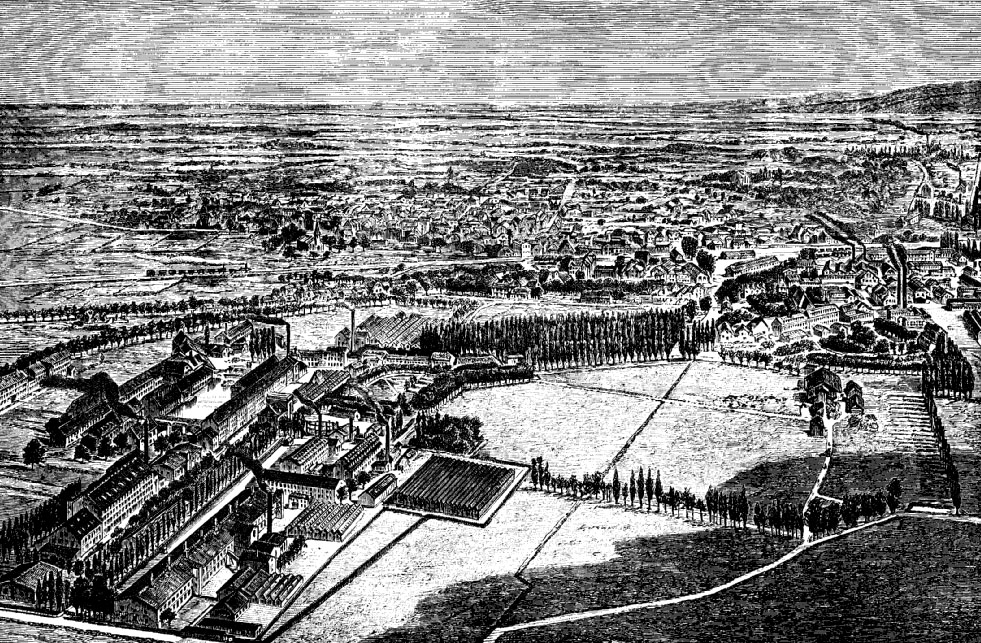 Etablissement Dollfus-Mieg à Dornach (Charles Grad, L'Alsace, le pays et ses habitants, Hachette, 1906 (rééd.), p. 215)